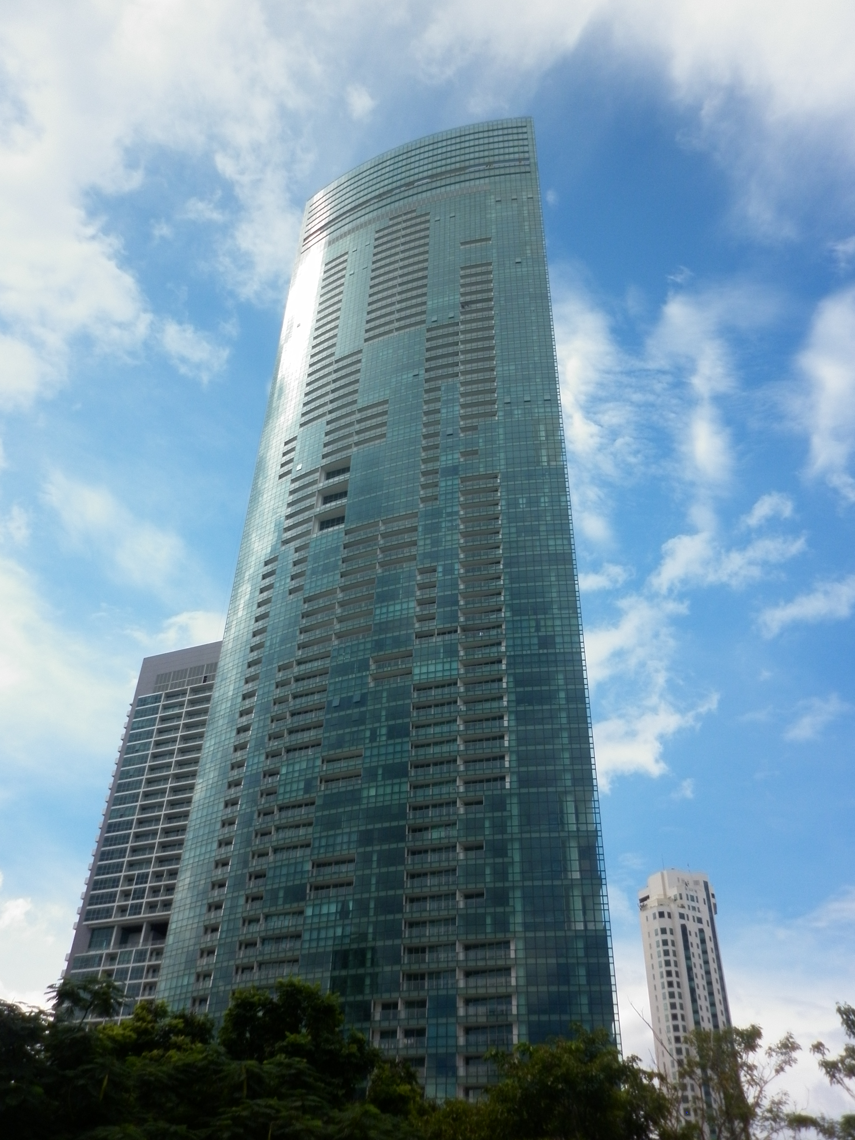 The River